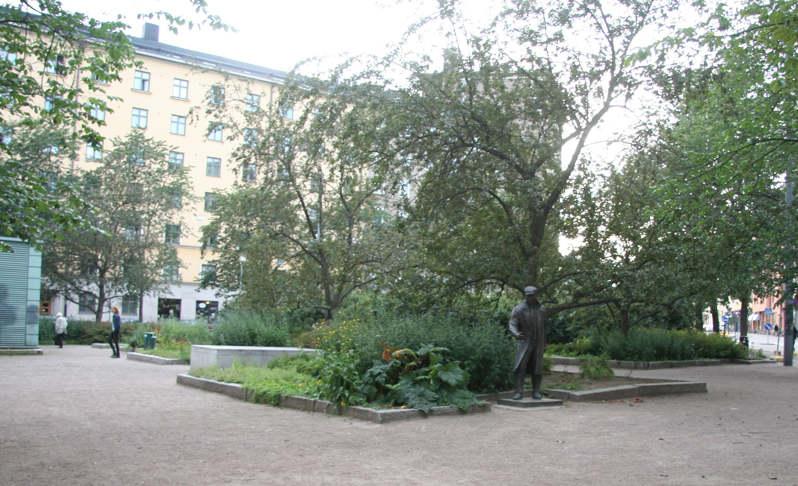 Lapinlahden puistikko, Kamppi, Helsinki